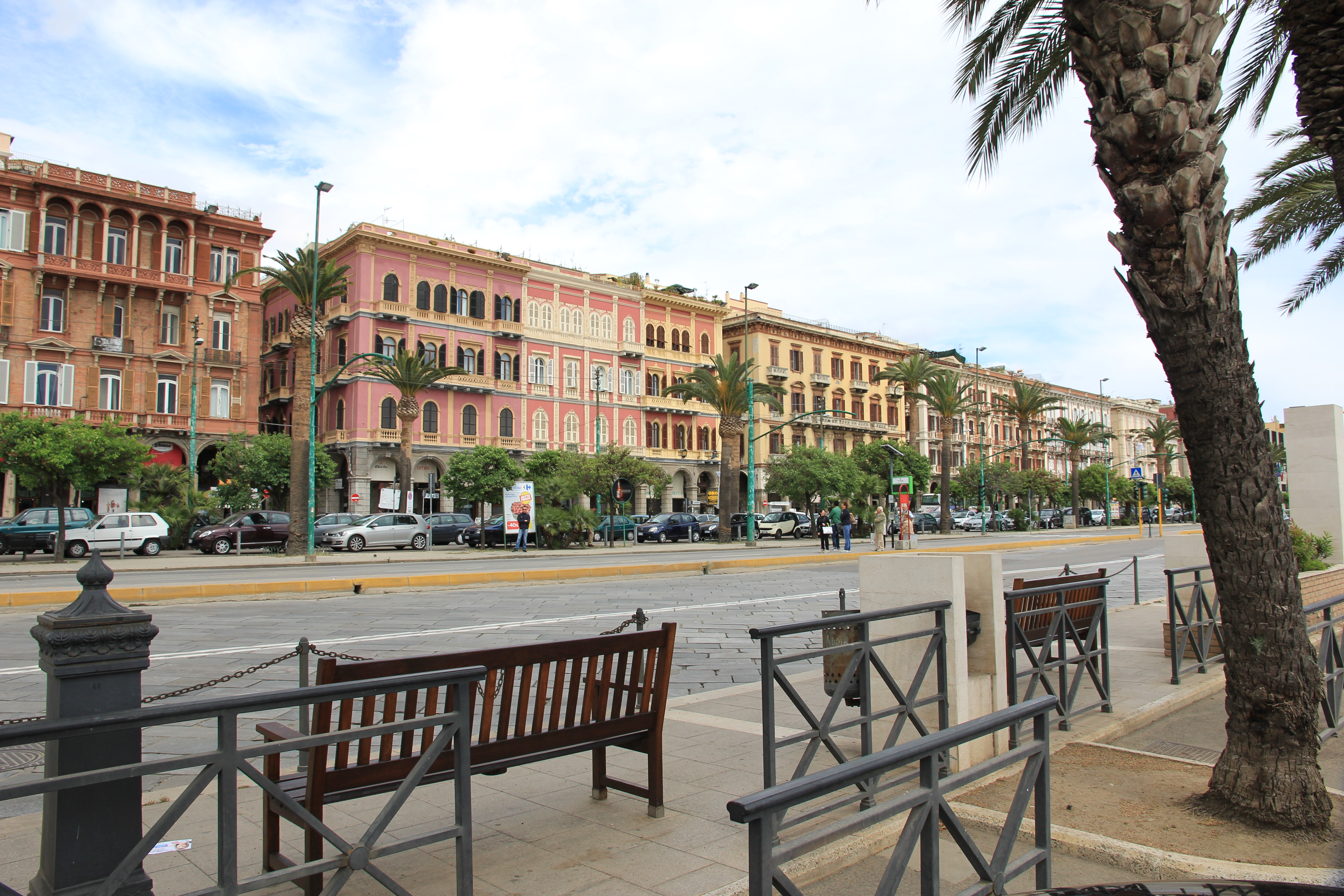 Cagliari - Via Roma